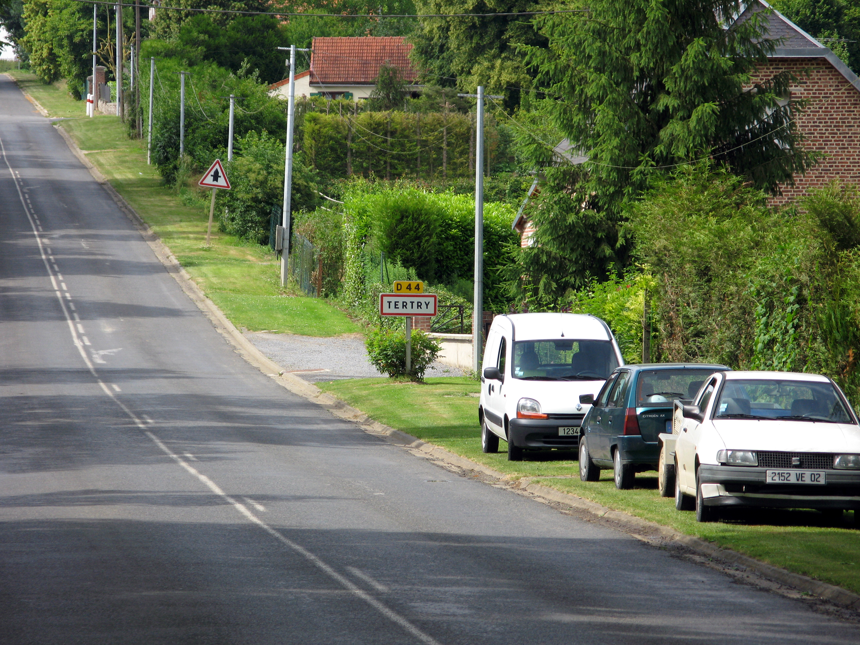 Tertry (Somme, France) - Entrée dans la commune par le Sud. Vue après le pont. . .